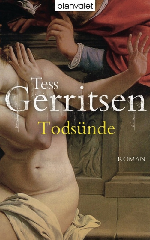 Tess Gerritsen: Todsünde. Blanvalet, München 2006. DNB; Ausschnitt aus Artemisia Gentileschi: Susanna und die Ältesten (1610)